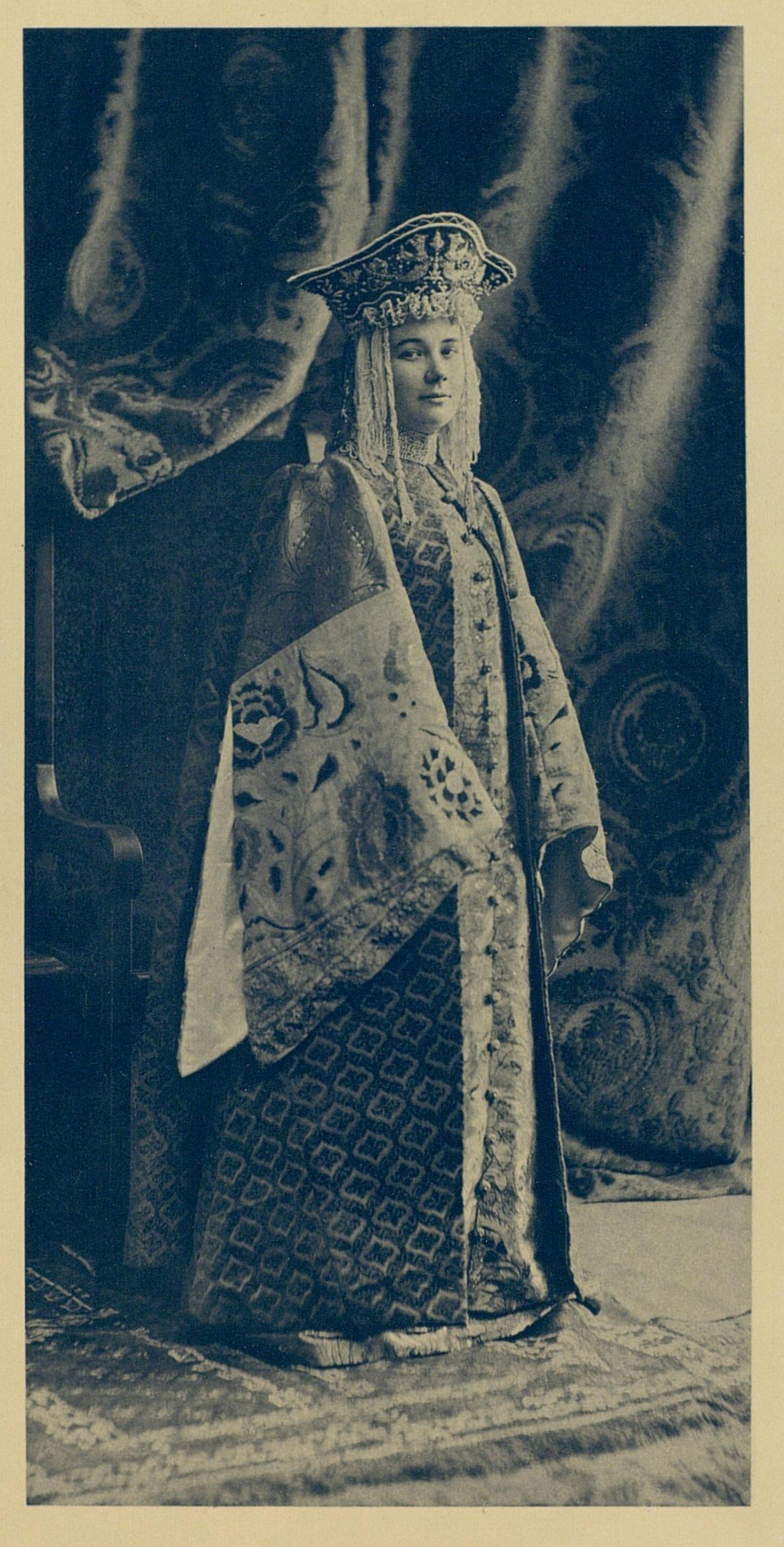 Графиня Надежда Петровна Гудович, урождённая княжна Гагарина, в наряде боярыни XVII века.